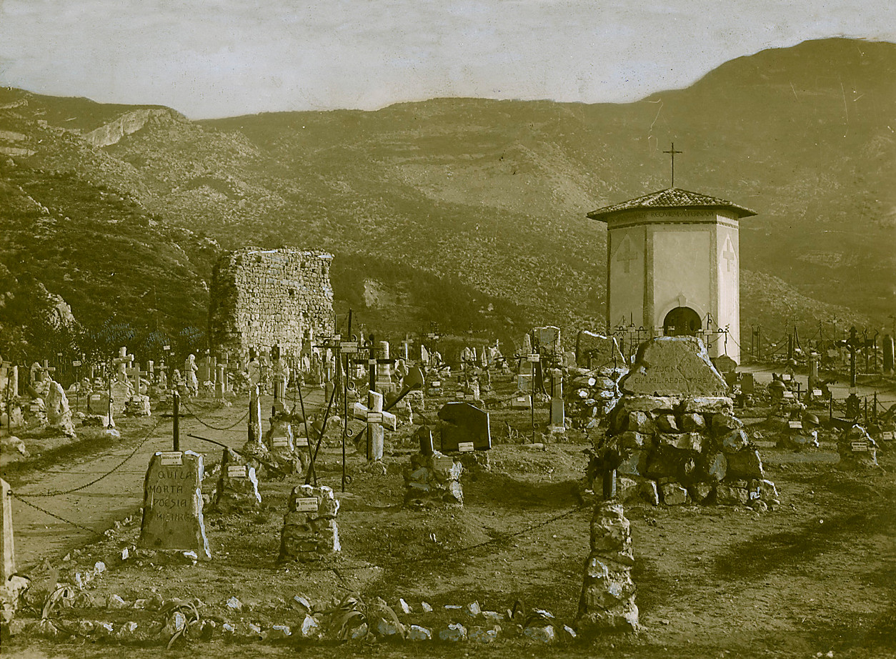 Cimitero militare di Castel Dante (Rovereto), lo Zugna sullo sfondo. Fot. Filipini-Rovereto